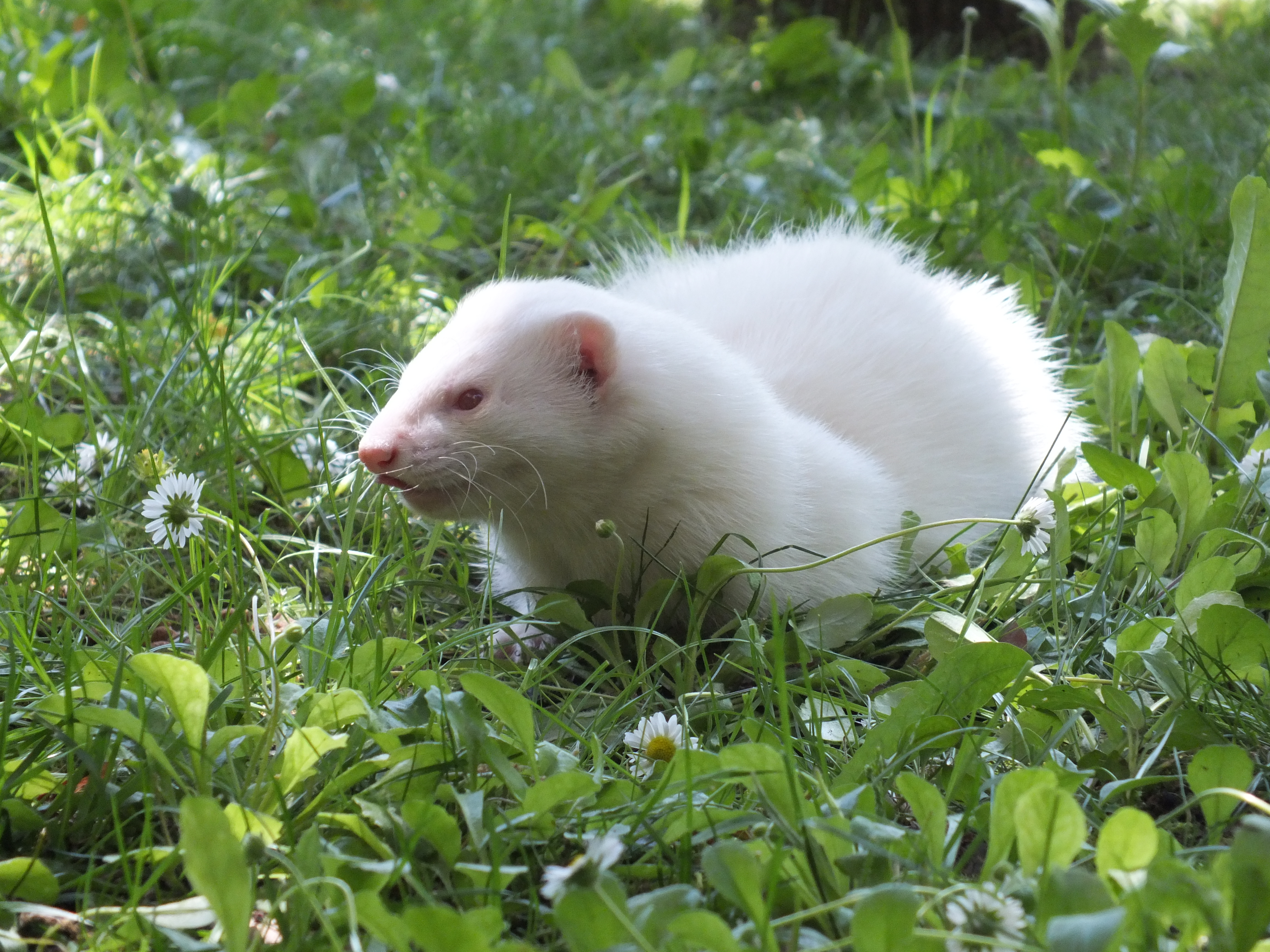 Coco, esemplare di albino